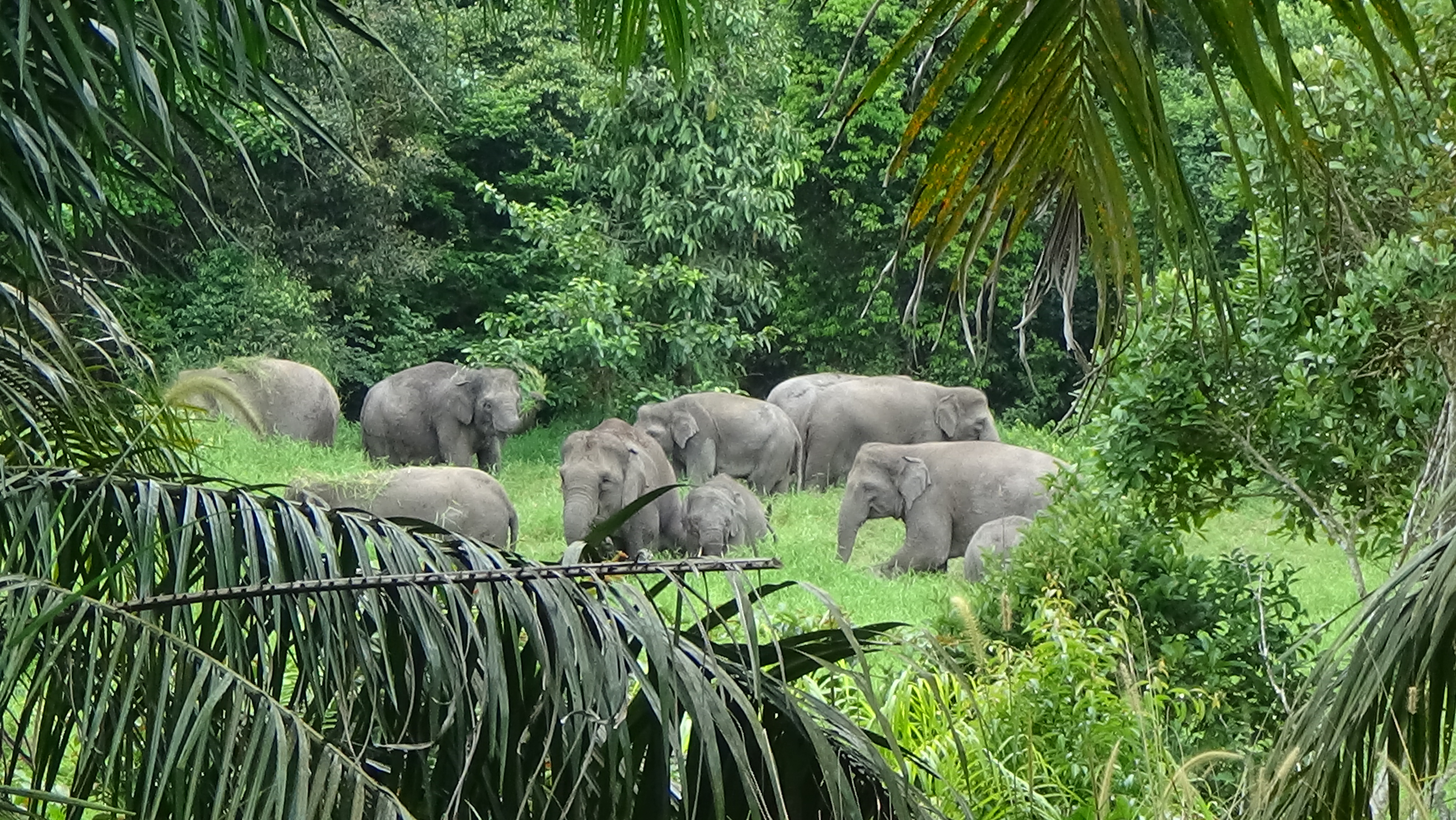 kelompok gajah balairaja bertahan hidup di habitat yang punah ranah